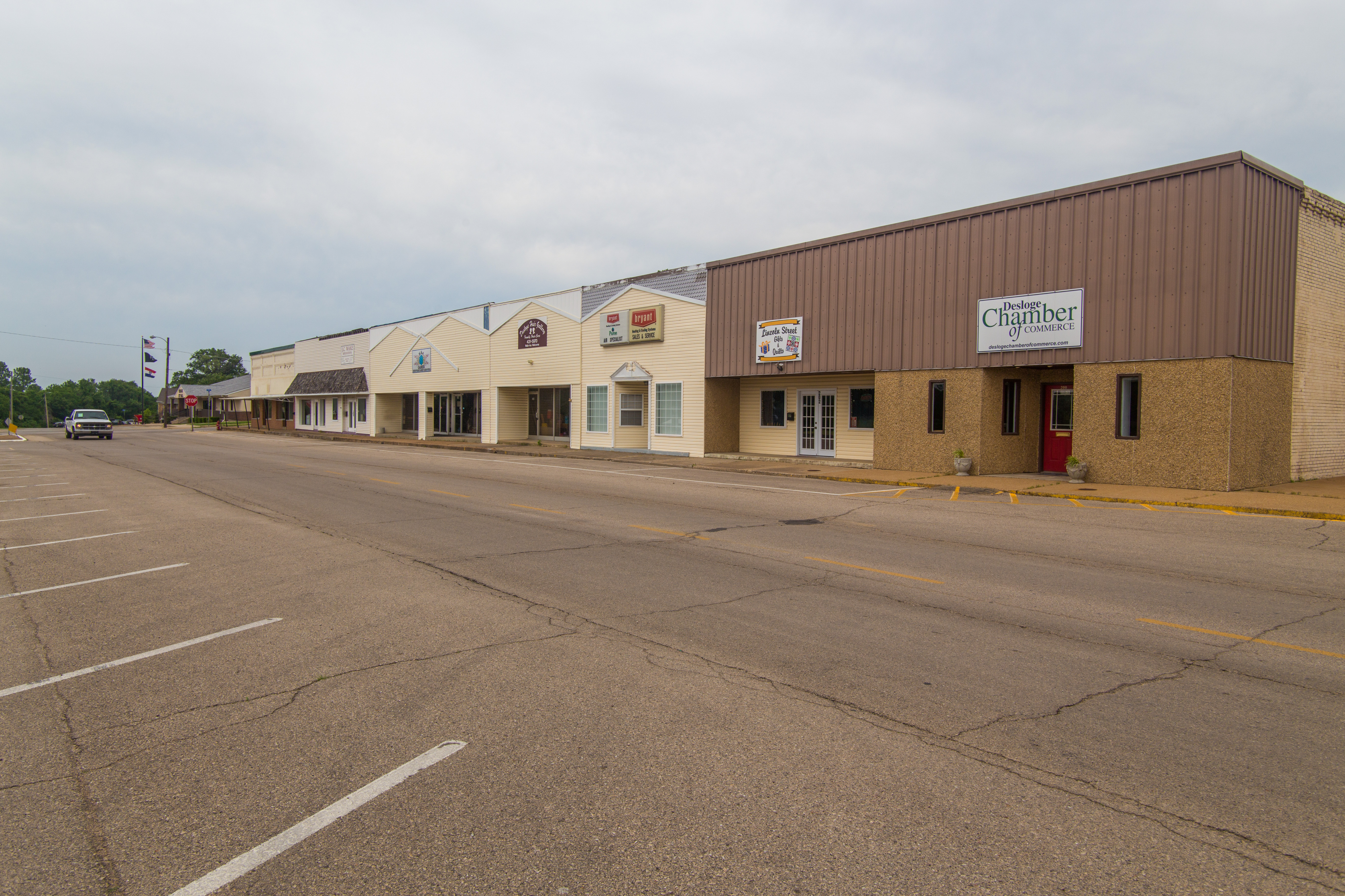 Desloge, Missouri